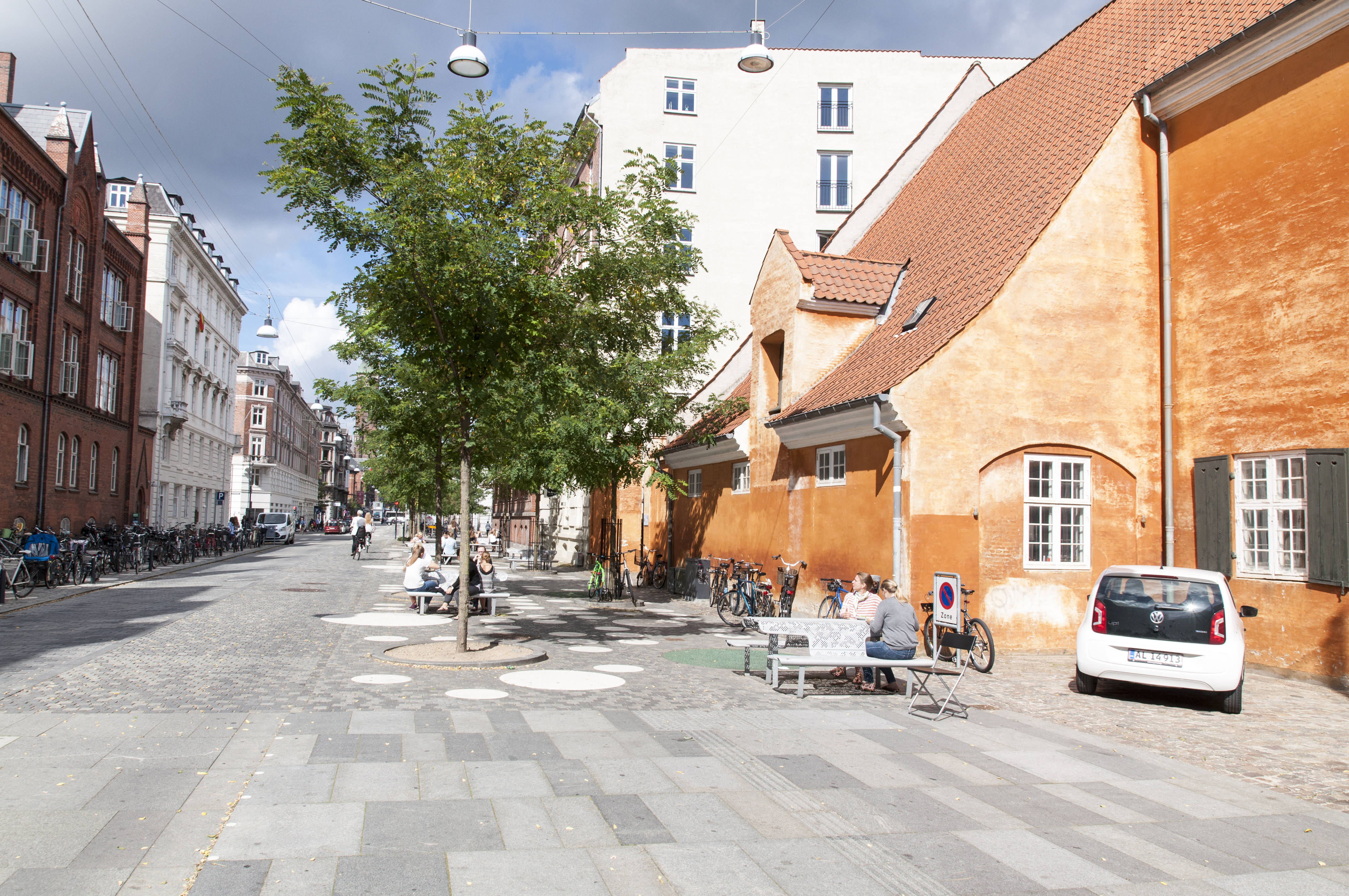 Vester Voldgade in Copenhagen, Denmark